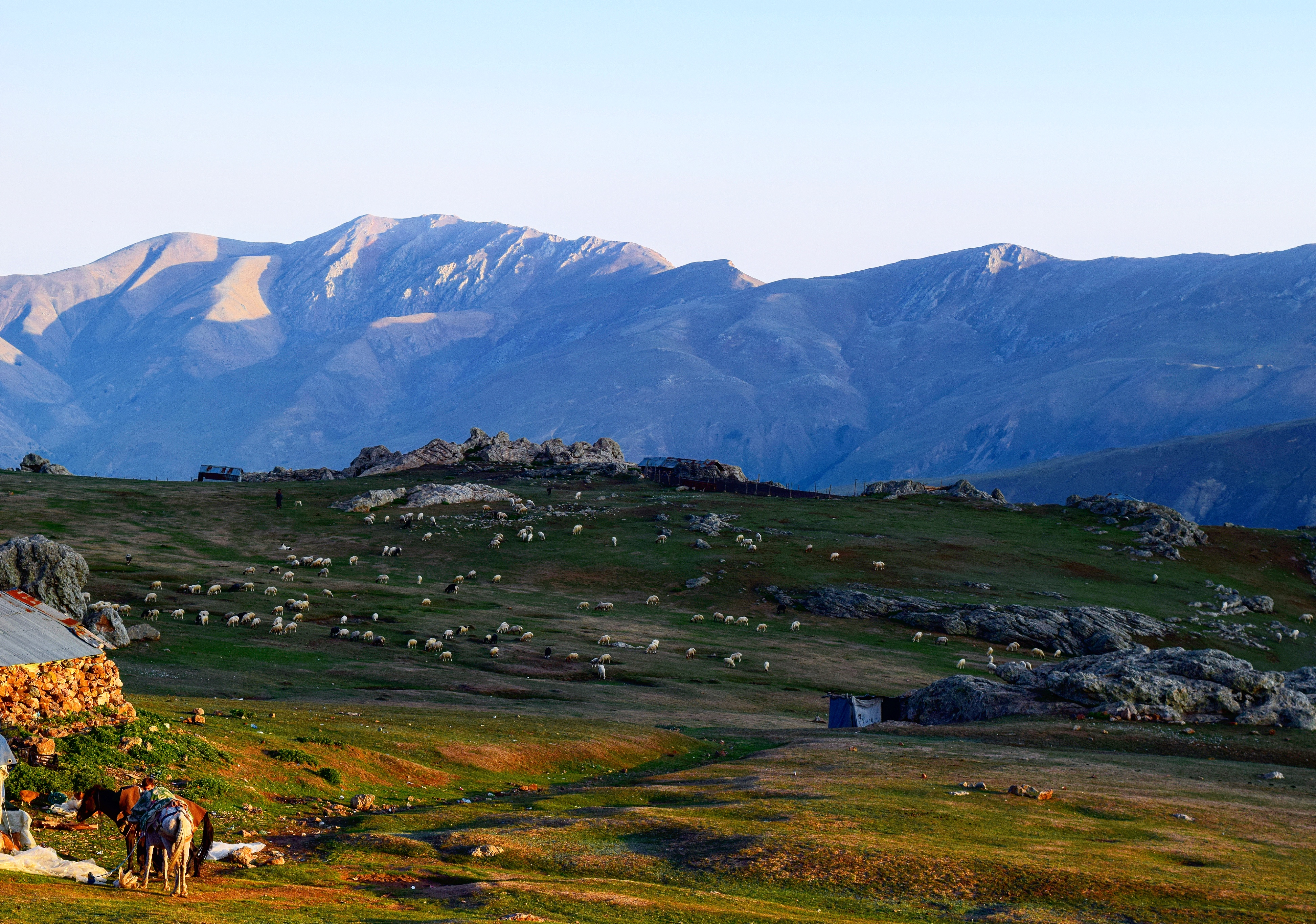 ییلاق دایله سر